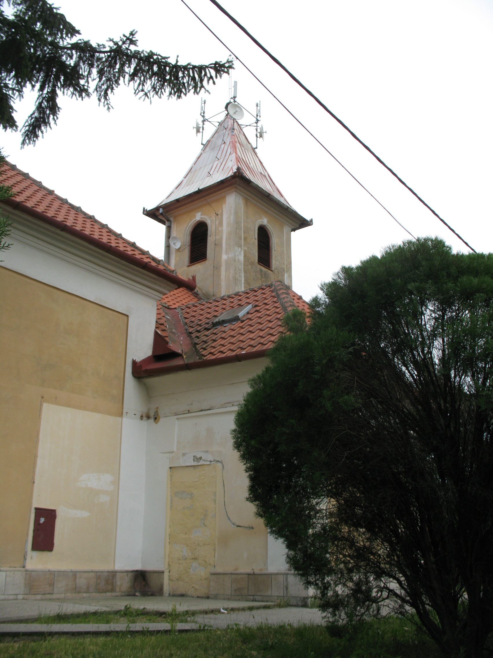 Vágpatta